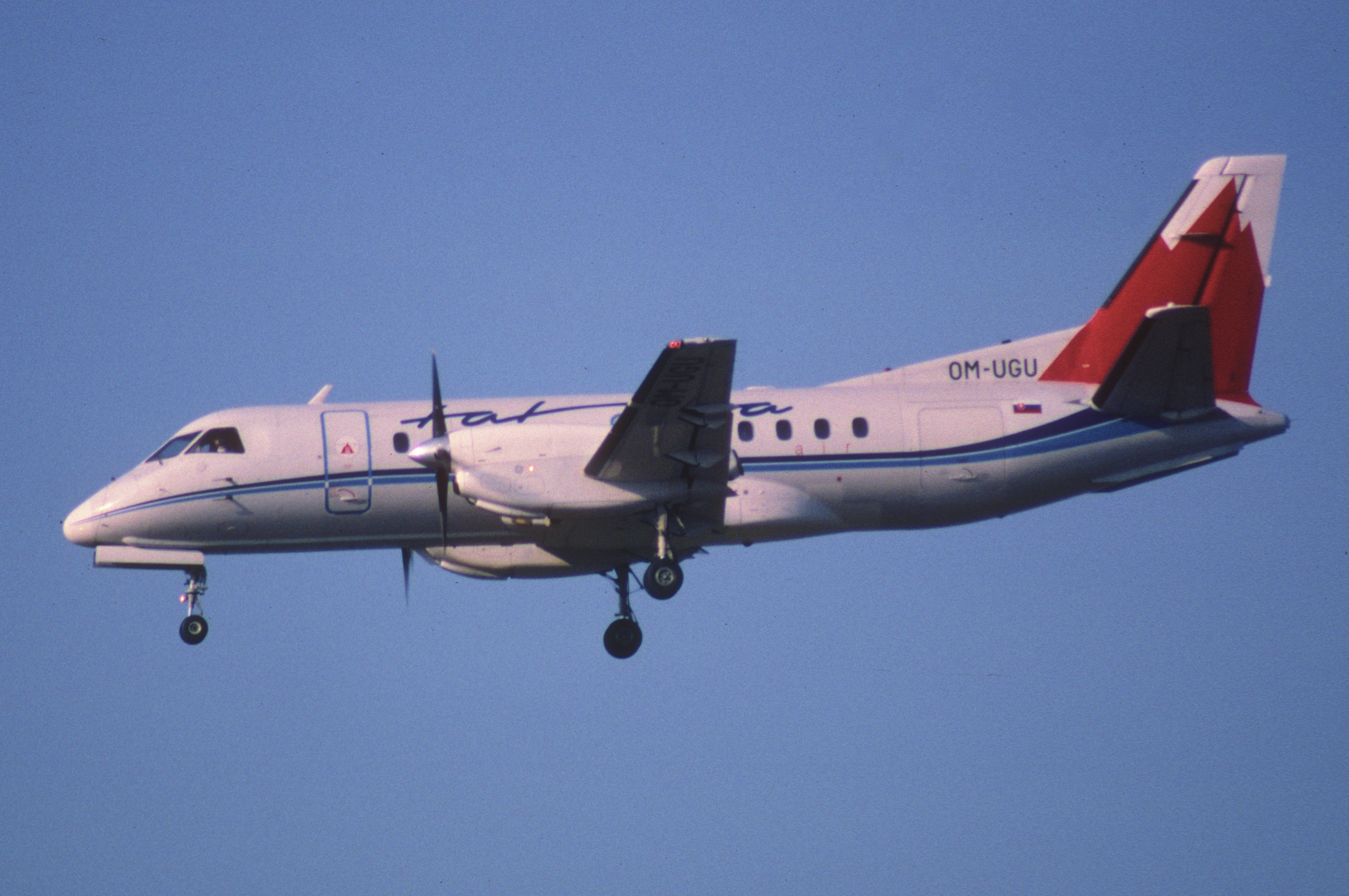 Tatra Air Saab 340B; OM-UGU@ZRH